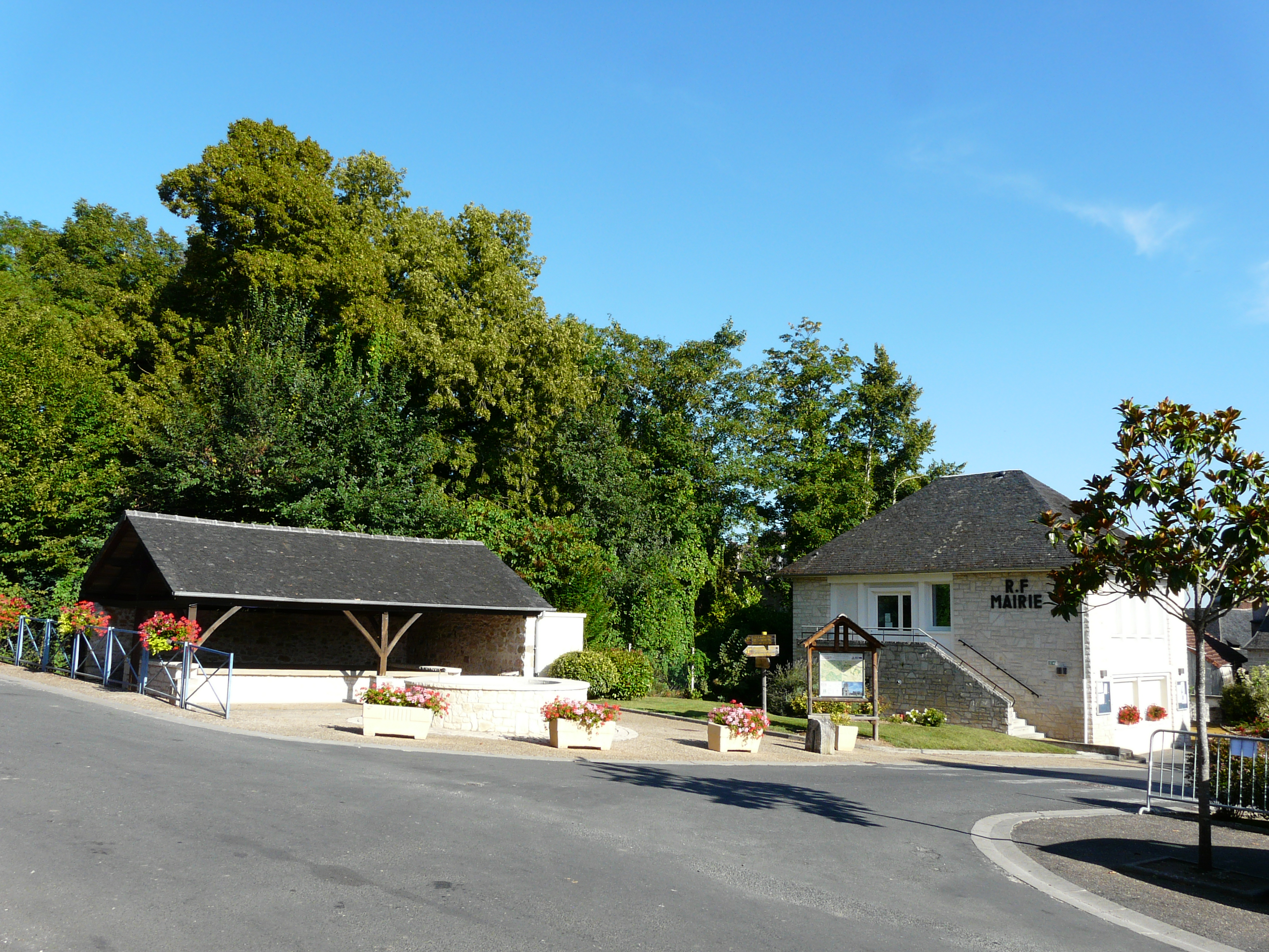 La place principale du village avec le lavoir et la mairie, Pazayac, Dordogne, France.